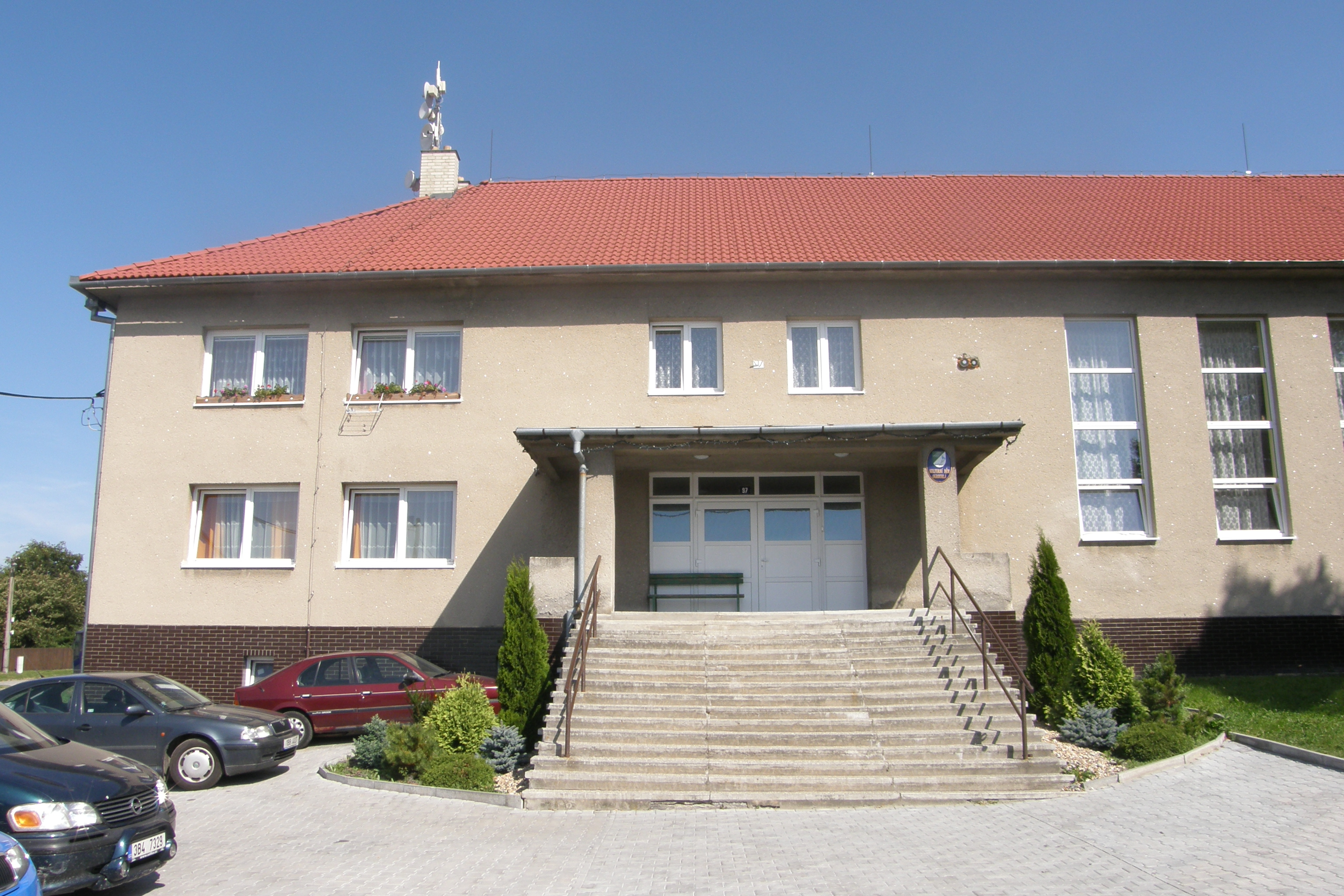 Kulturní dům v Okrouhlé, okres Blansko